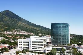 SAN SALVADOR CITY (WORLD TRADE CENTER)